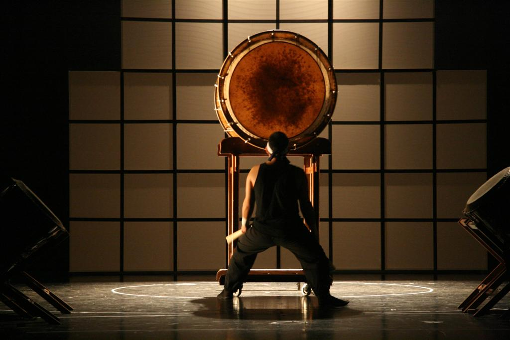 Apresentações de Taiko, dia 08/08/2008, na Sala Acrísio de Camargo (CIAEI), em Indaiatuba/SP. Grupos convidados de Jundiaí e Atibaia. Foto: Luma Kimura